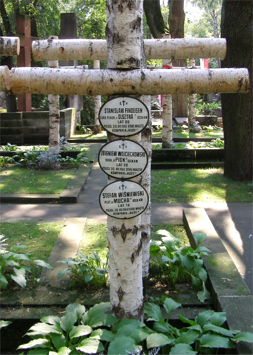 Zbigniew Wojciechowski, Stanisław Findeisen, Stefan Wiśniewski